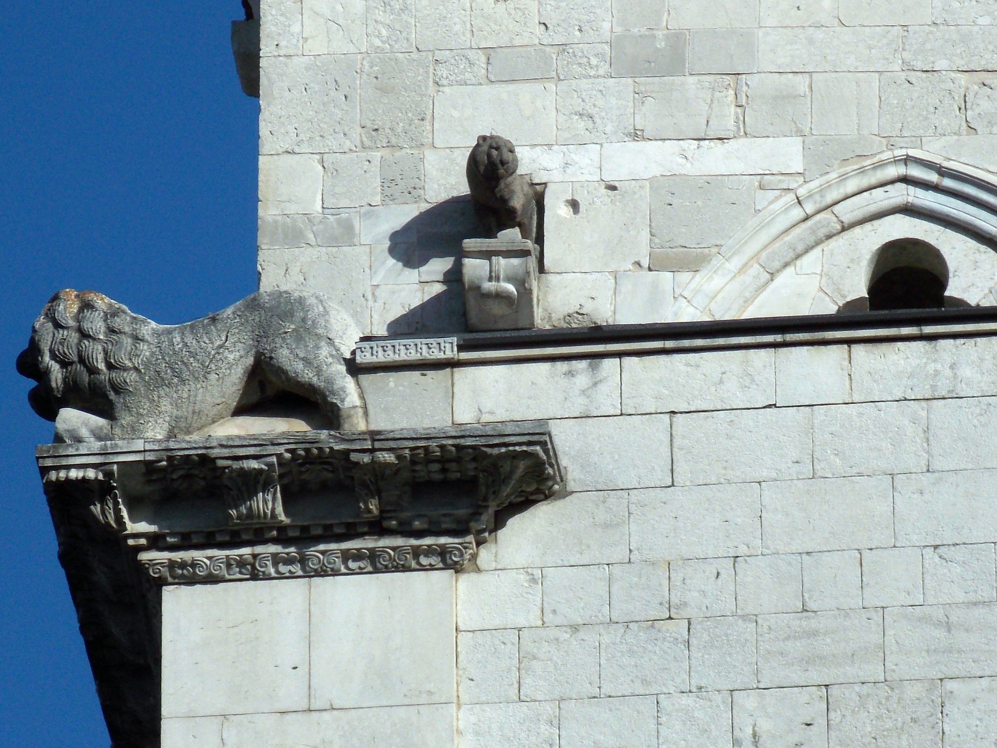 Un leone trainante in origine il carro di Cibele inserito nella muratura del campanile del duomo di Benevento.